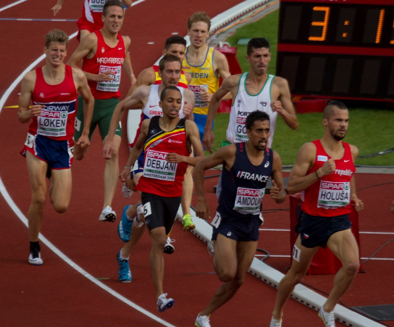 0677 1500m reeksen debjani